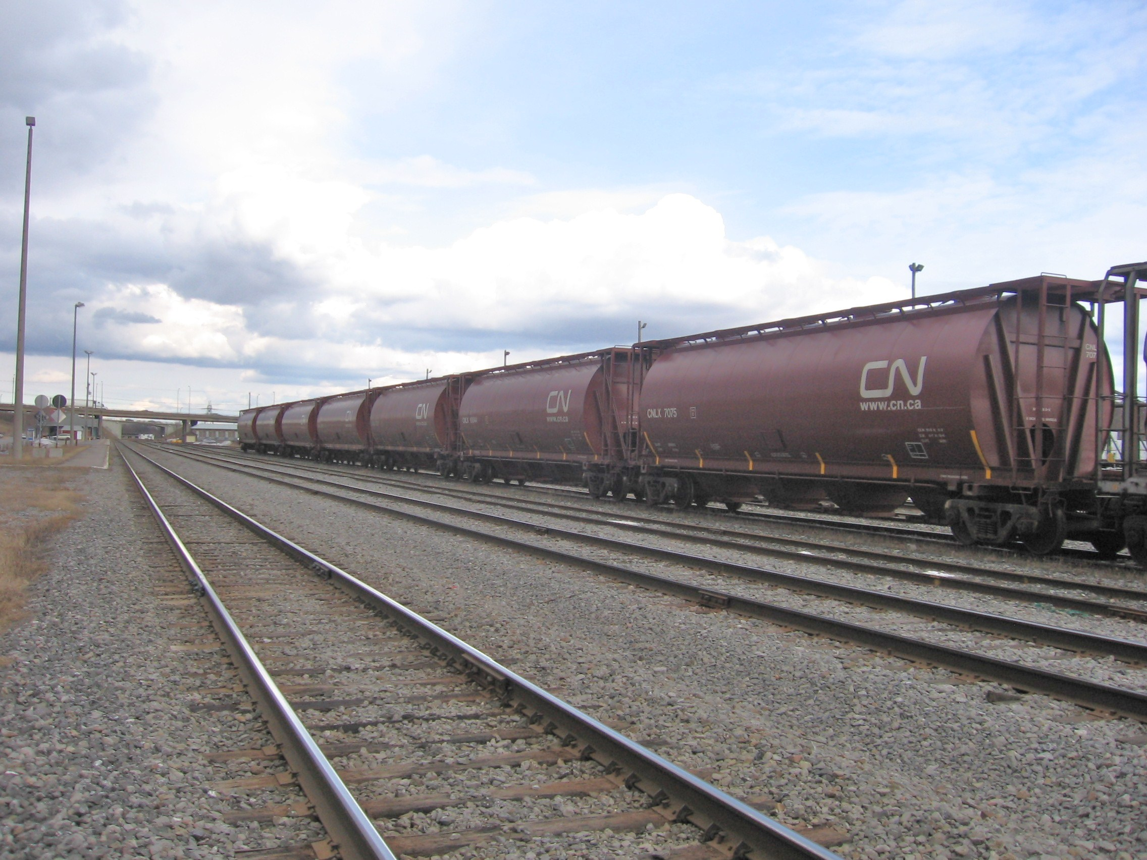 Gondola du Canadien National, Sainte-Foy, Quebec